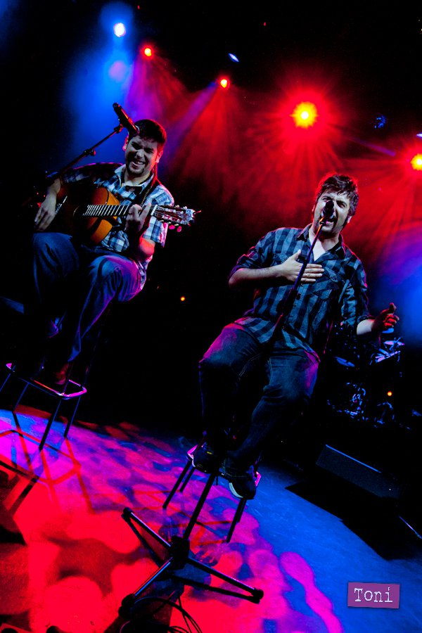 Estopa en directo en la Sala Luz de Gas